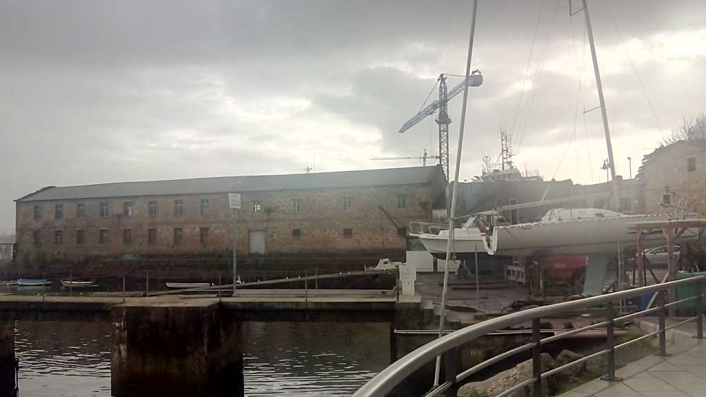 Estaleiro da Graña.